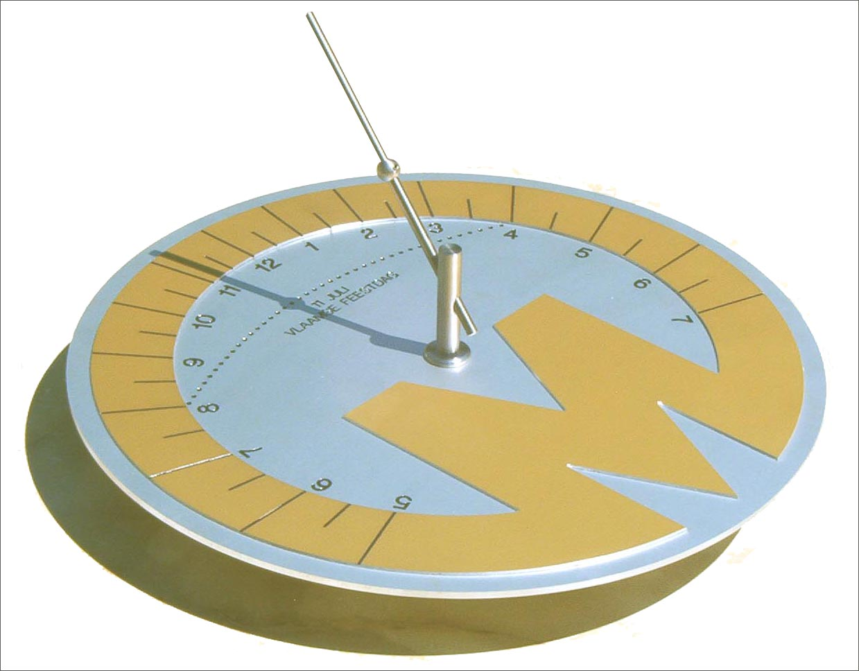 Zonnewijzer ontworpen door Willy Leenders Op het logo van de serviceclub Marnixring wordt het uur aangeduid. De schaduw van een bolletje schuift op 11 juli, de Vlaamse feestdag, over een gebogen puntlijn. Foto genomen door Willy Leenders en door hem in het publieke domein geplaatst.